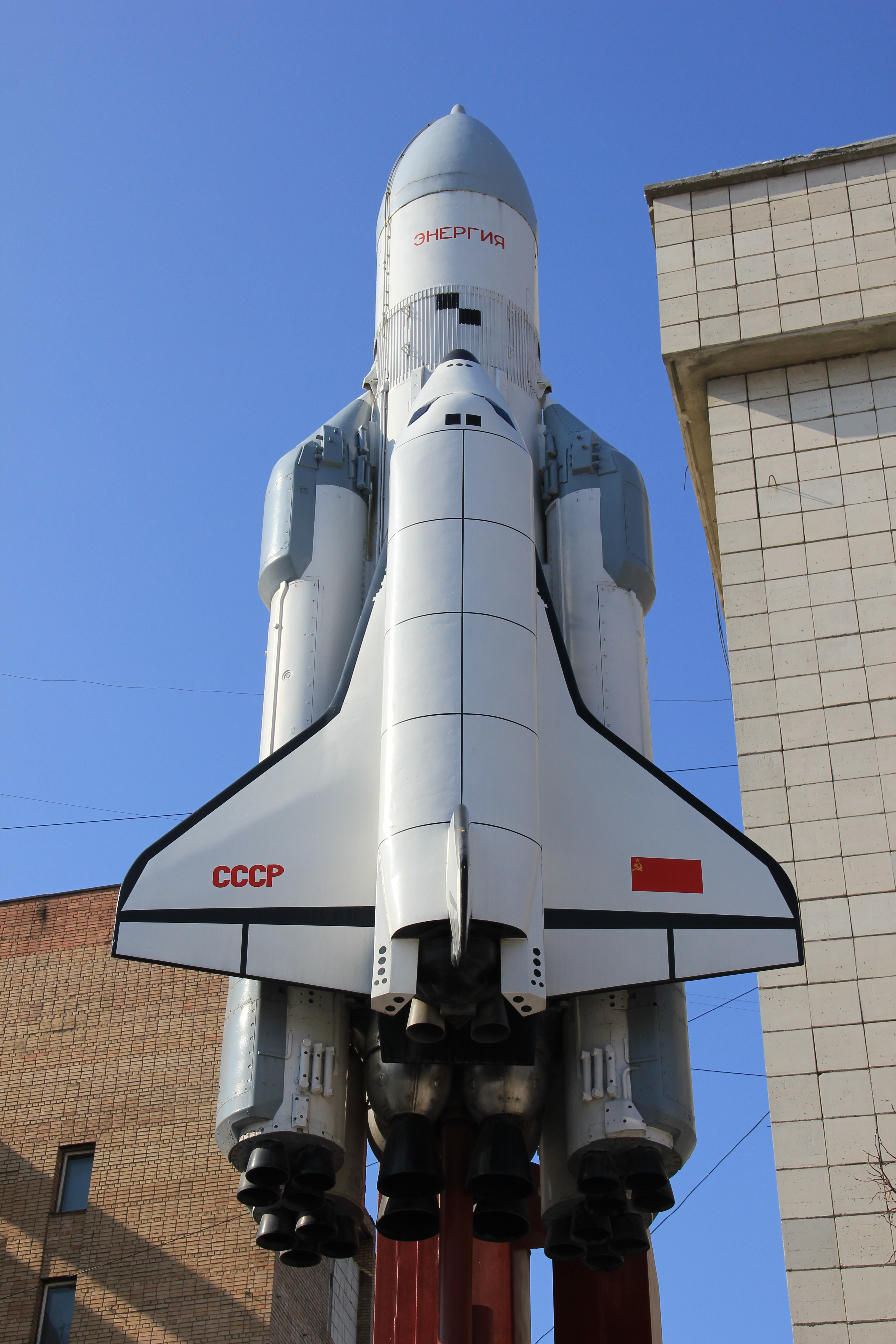 Монумент "Энергия-Буран"